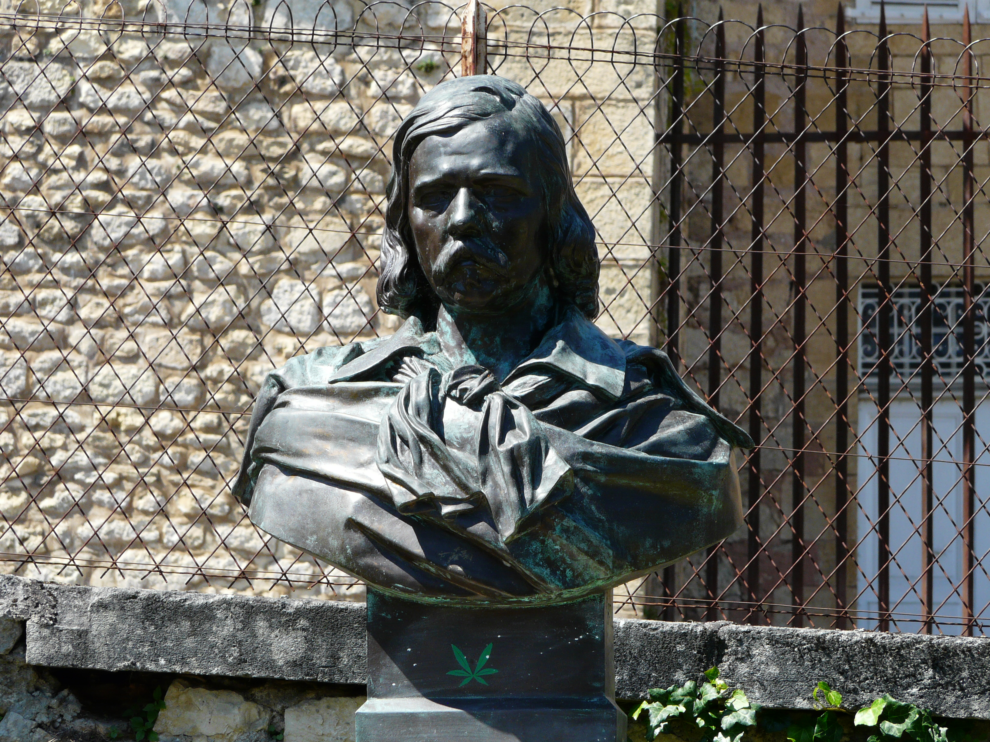 Buste de Pierre Lachambeaudie, œuvre de Ferdinand Taluet, dans le square Pautauberge à Montignac, Dordogne, France.